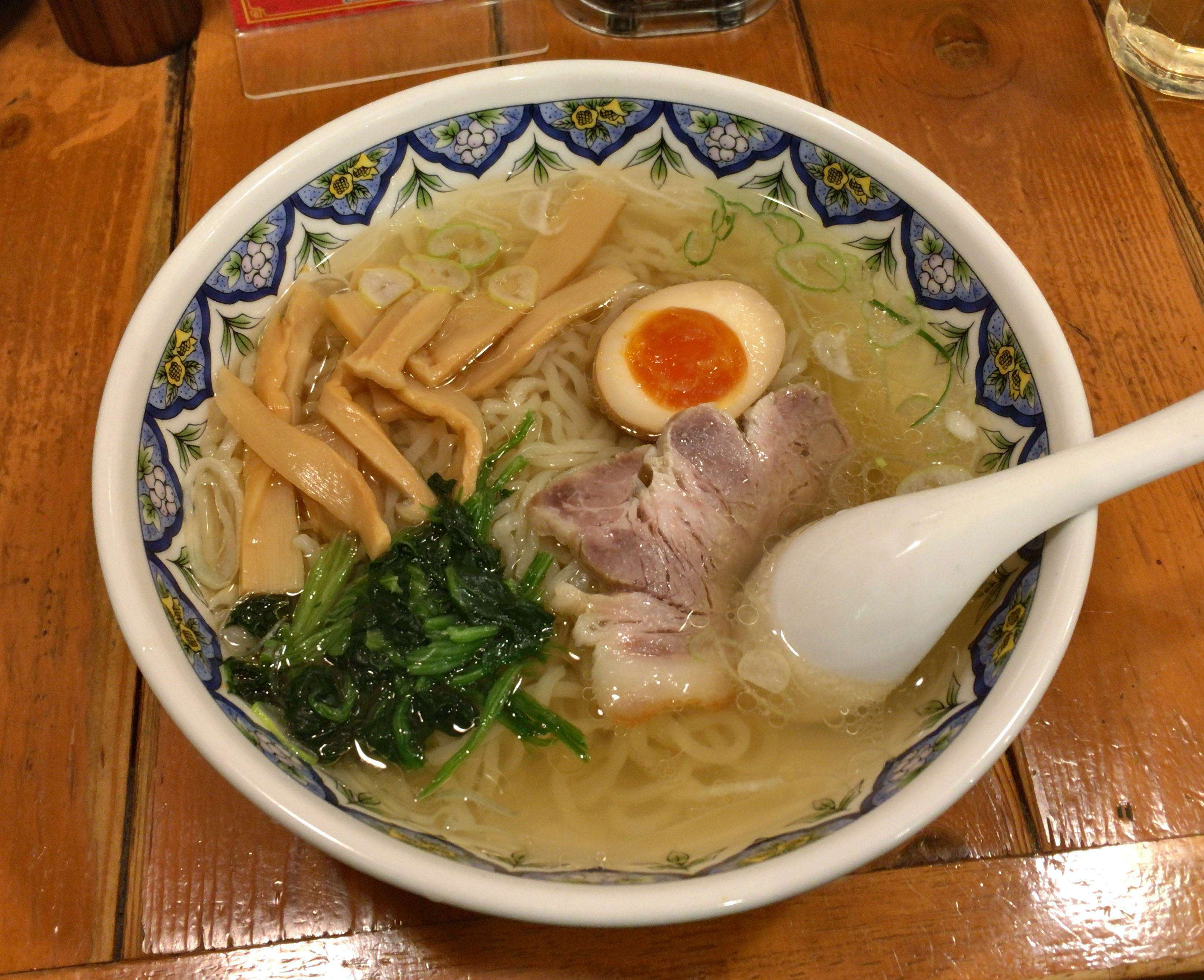 揚州商人の塩ラーメン（揚州麺）